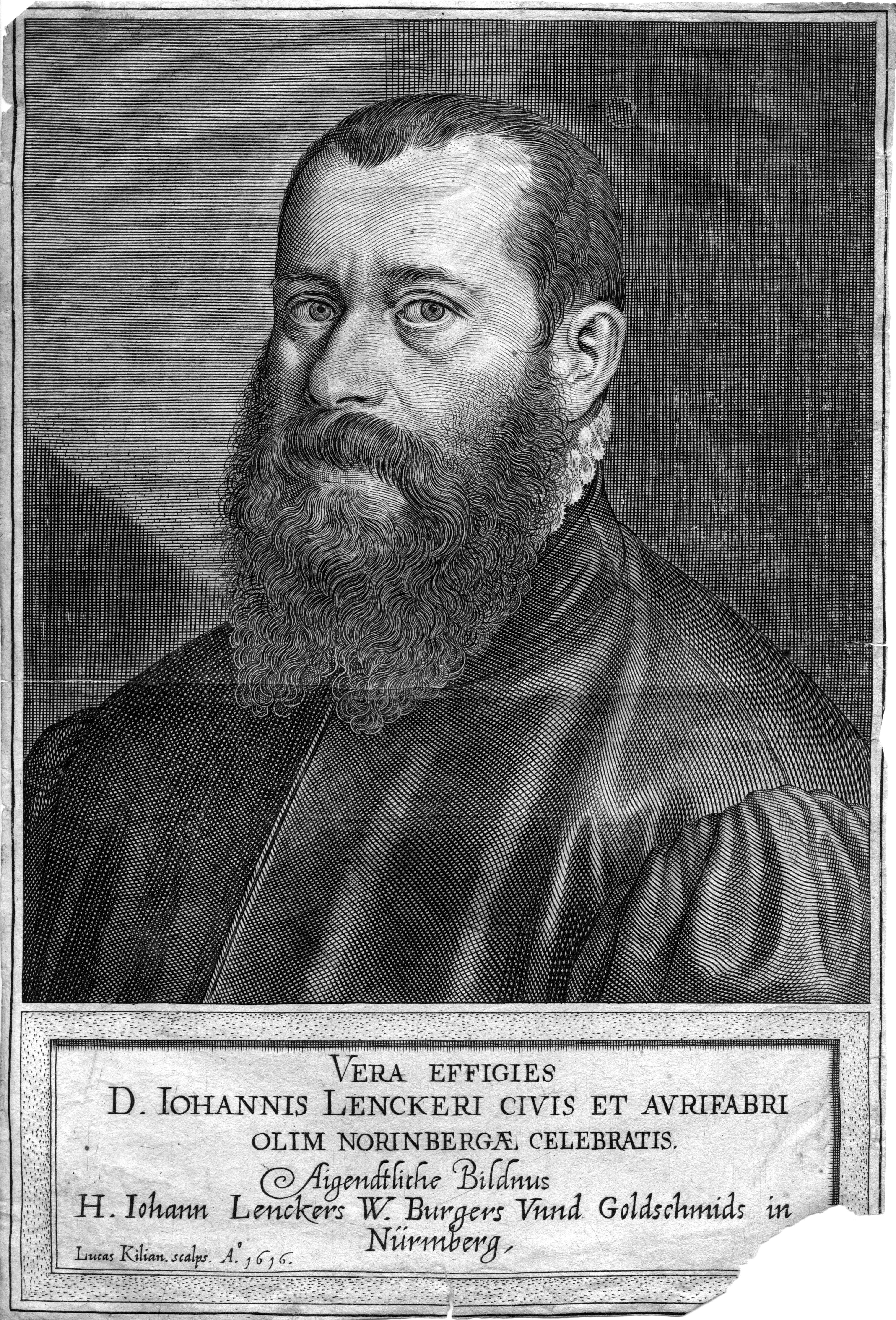 portrait gravé